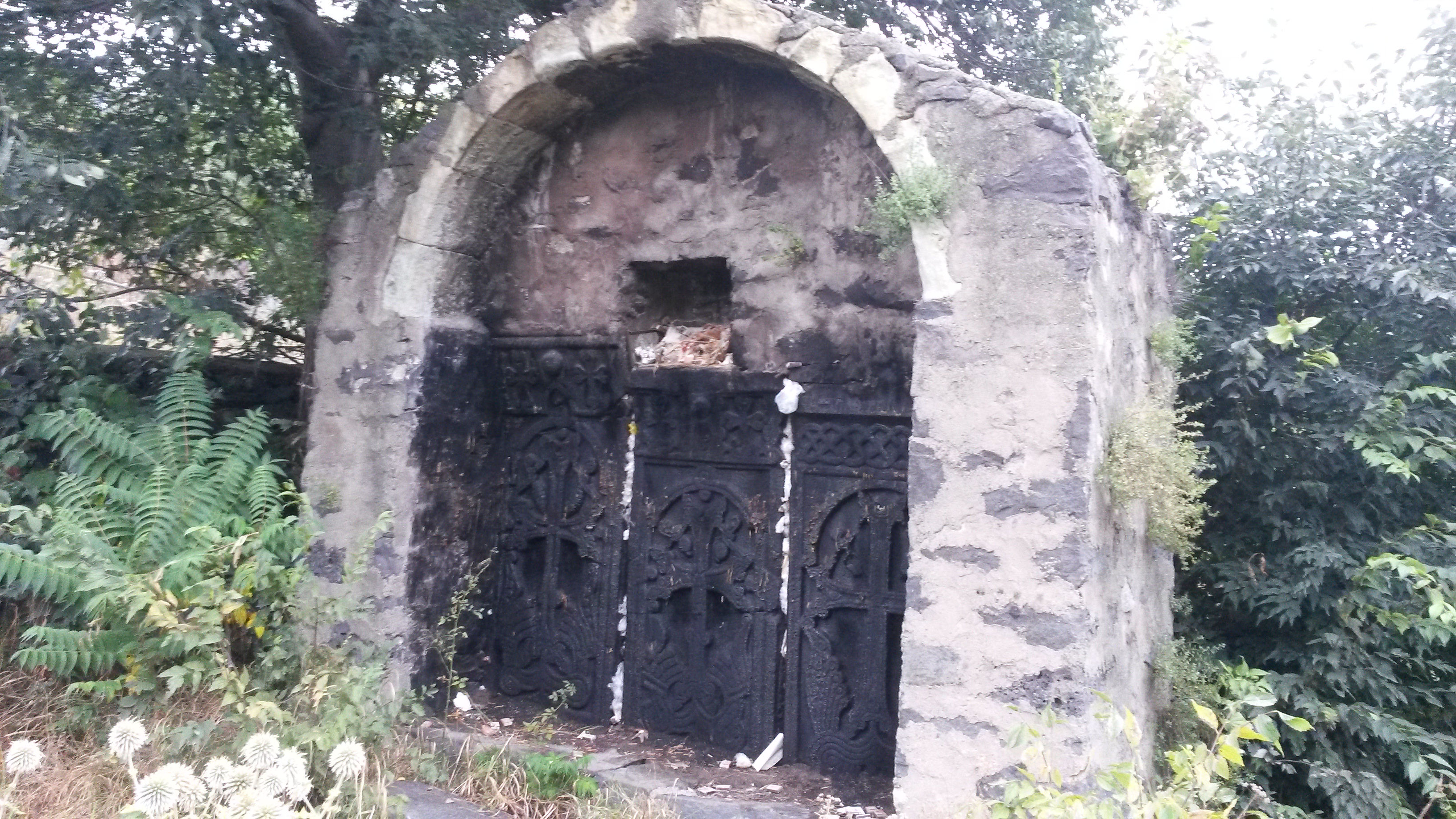 Մատուռ Սբ. Աստվածածին («Տերունական խաչարձան»),Լոռու մարզ, գյուղ Շնող 88/2.7